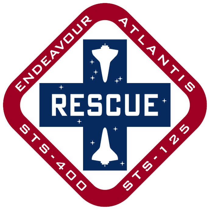 Insignia de la misión auxiliar STS-400